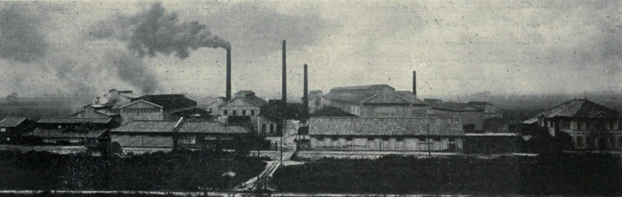 わが国最初の民間平炉工場たる日本鋳鋼所を買収して、住友鋳鋼場を開設し、鉄道・船舶・鉱山用等の鋳鋼品の製造を始む。